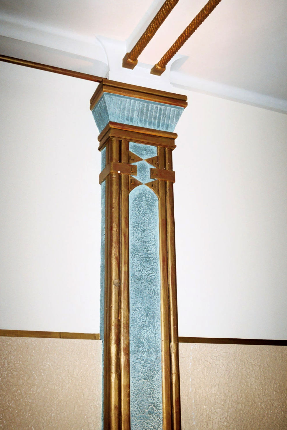 Belgique - Bruxelles - Complexe Albert Hall - Roseland